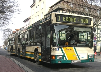 Wagen 344 der GöVB